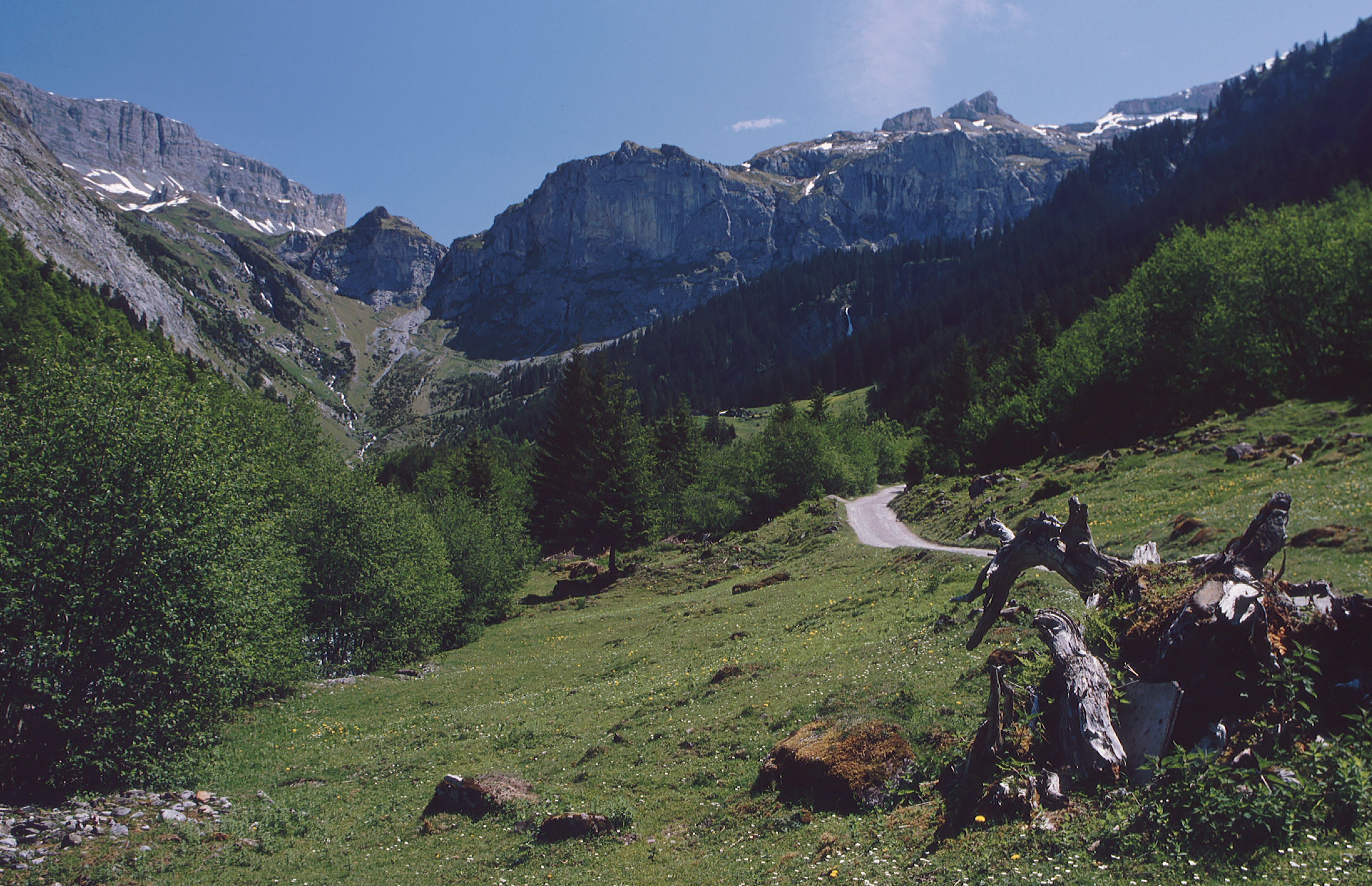 Schächental/Kanton Uri/Zentralschwez - Blick in Richtung Talende